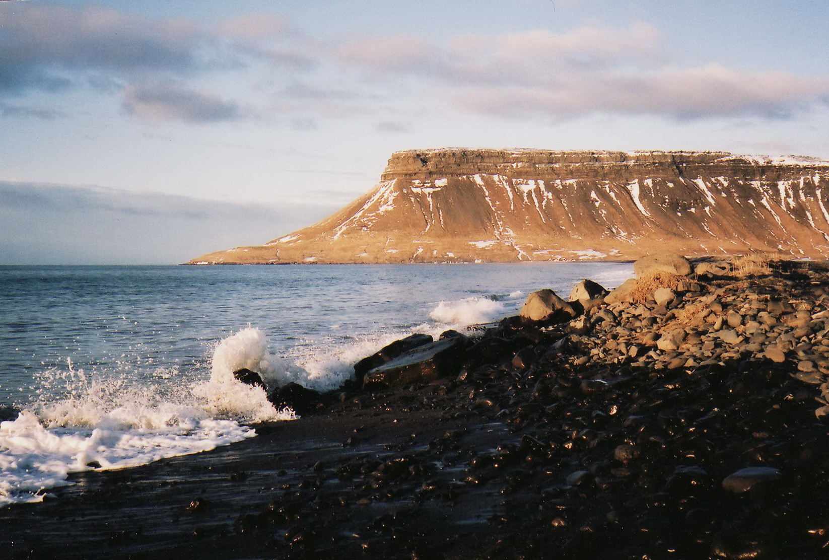 Stöðin við Grundarfjörð á Snæfellsnesi vestur Íslandi .